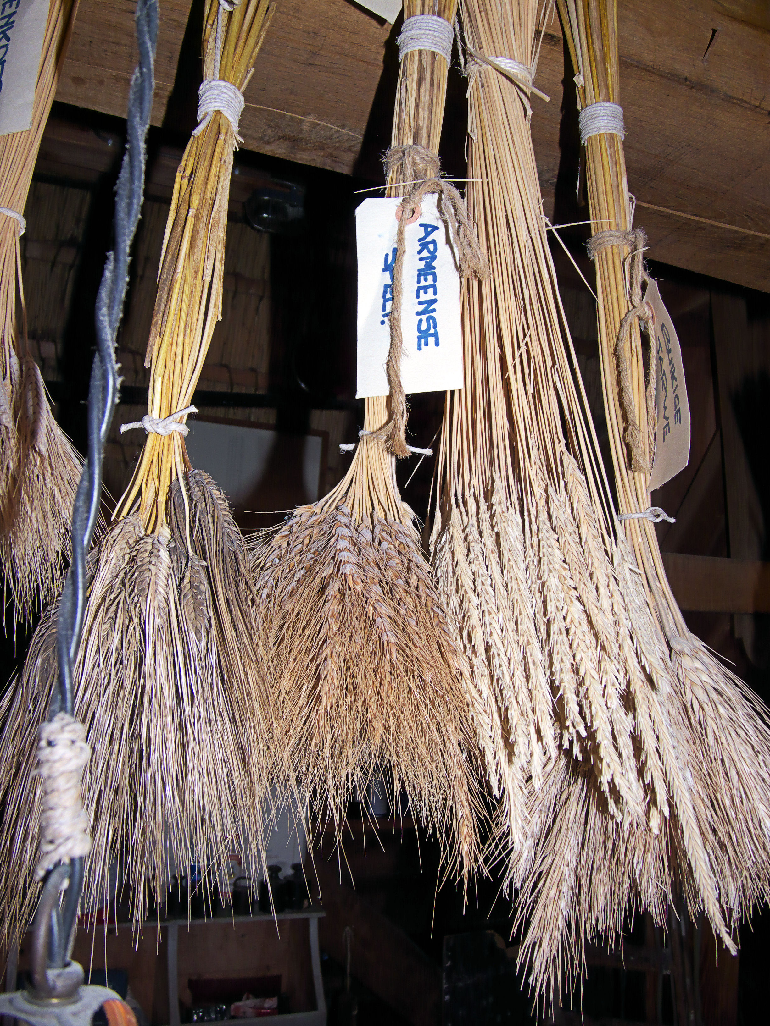 Triticum spelta, Armeense spelt